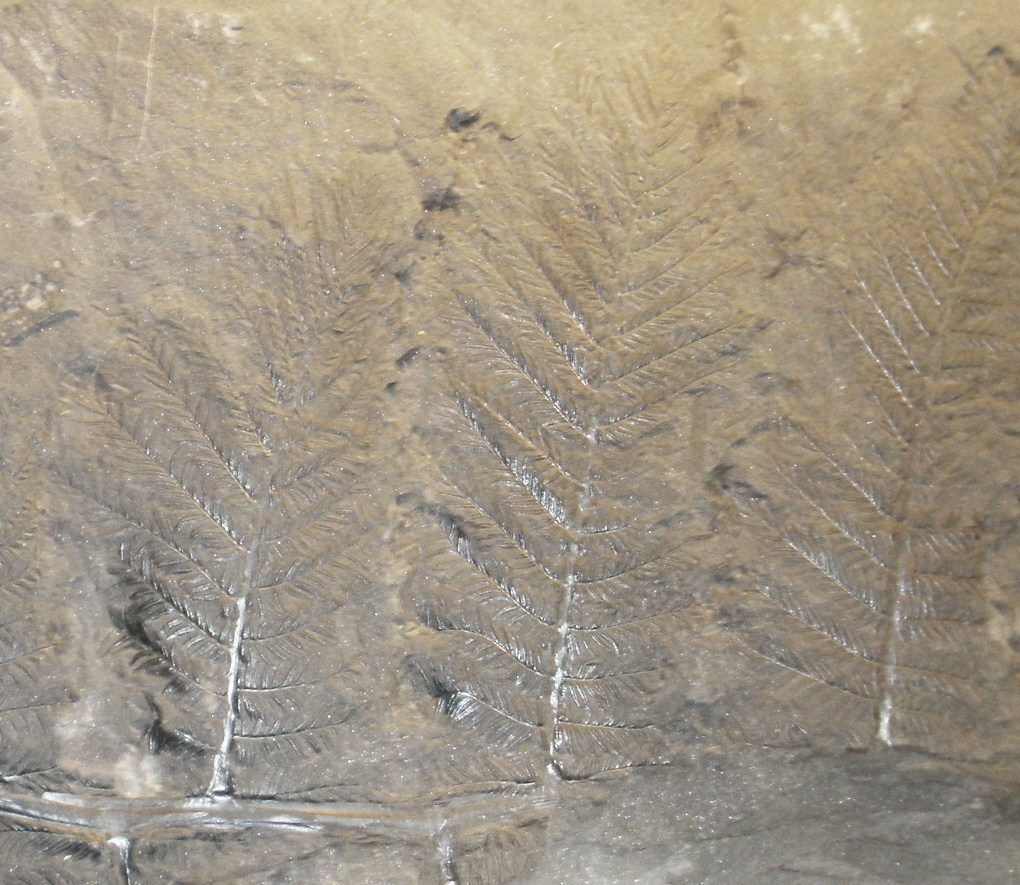 Fossil of Alethopteris, an extinct plant Took the photo at Musee d'Histoire Naturelle, Brussels